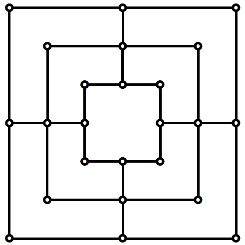 Igra sa 9 figura